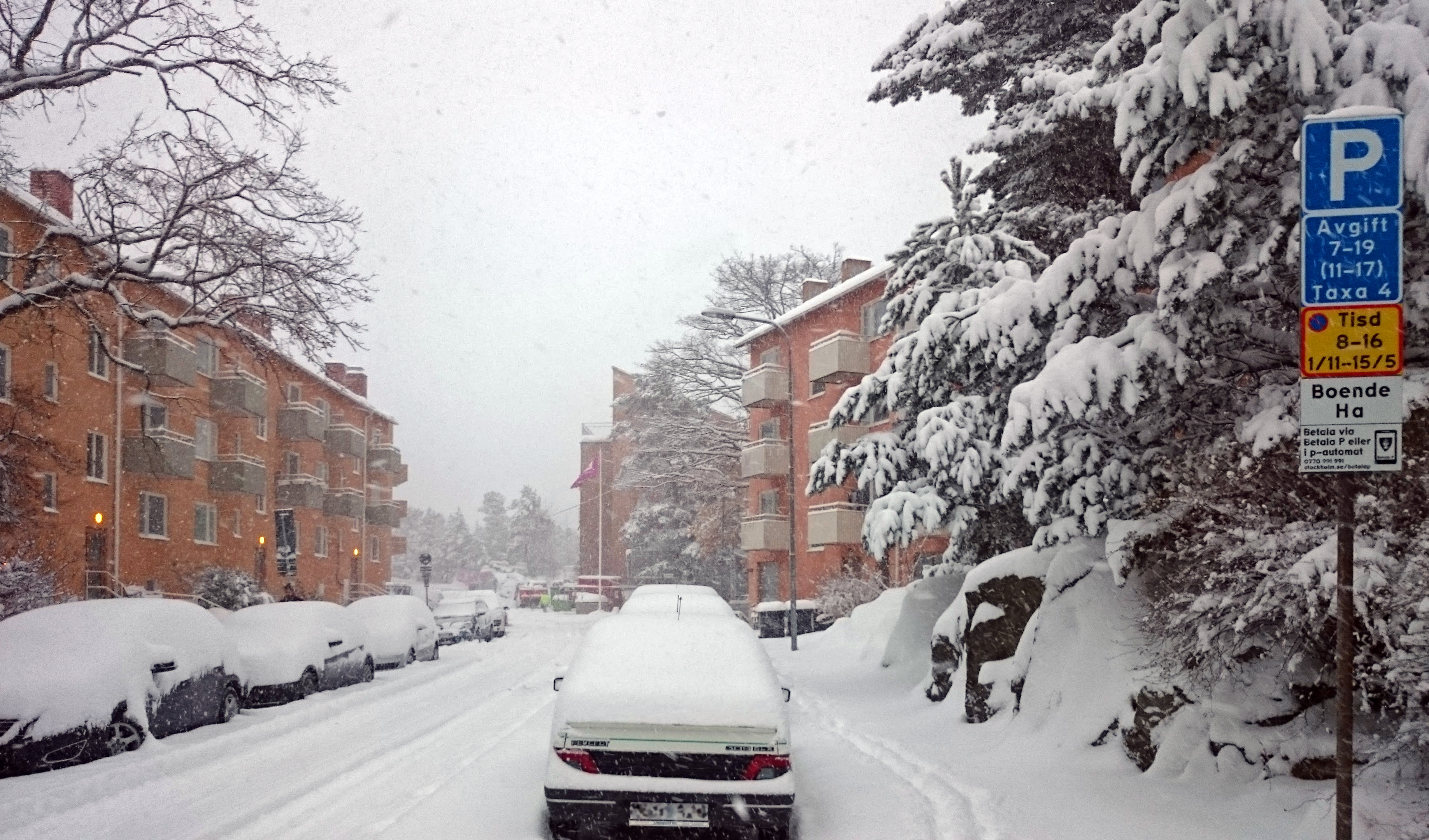 Finn Malmgrens väg i november 2016.